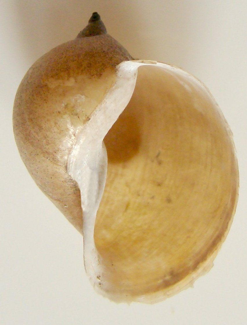 Lymnaea auricularia (Radix auricularia)